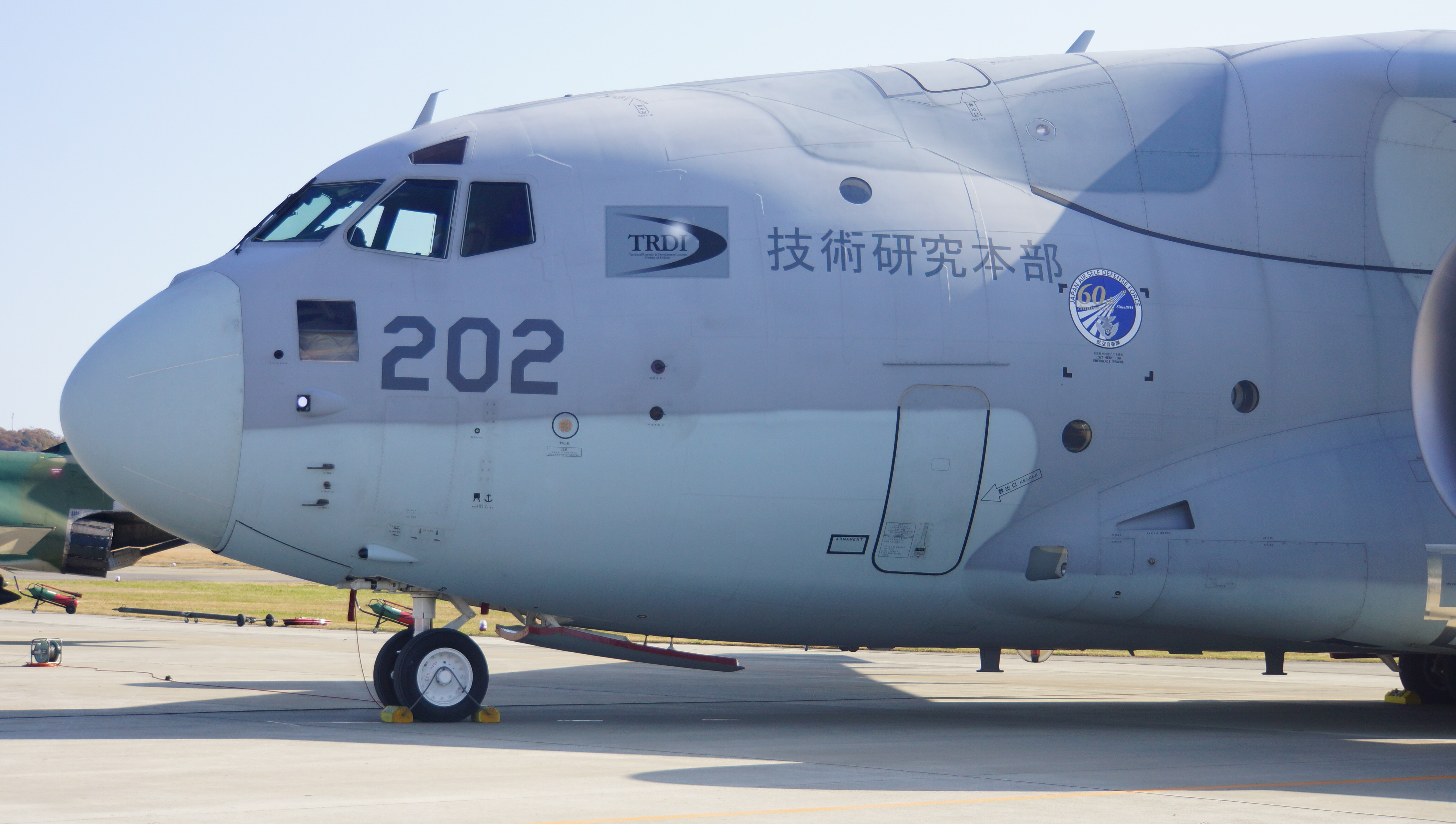 航空自衛隊 XC-2輸送機（18-1202号機） 前部胴体。 14年11月23日 航空自衛隊岐阜基地にて。